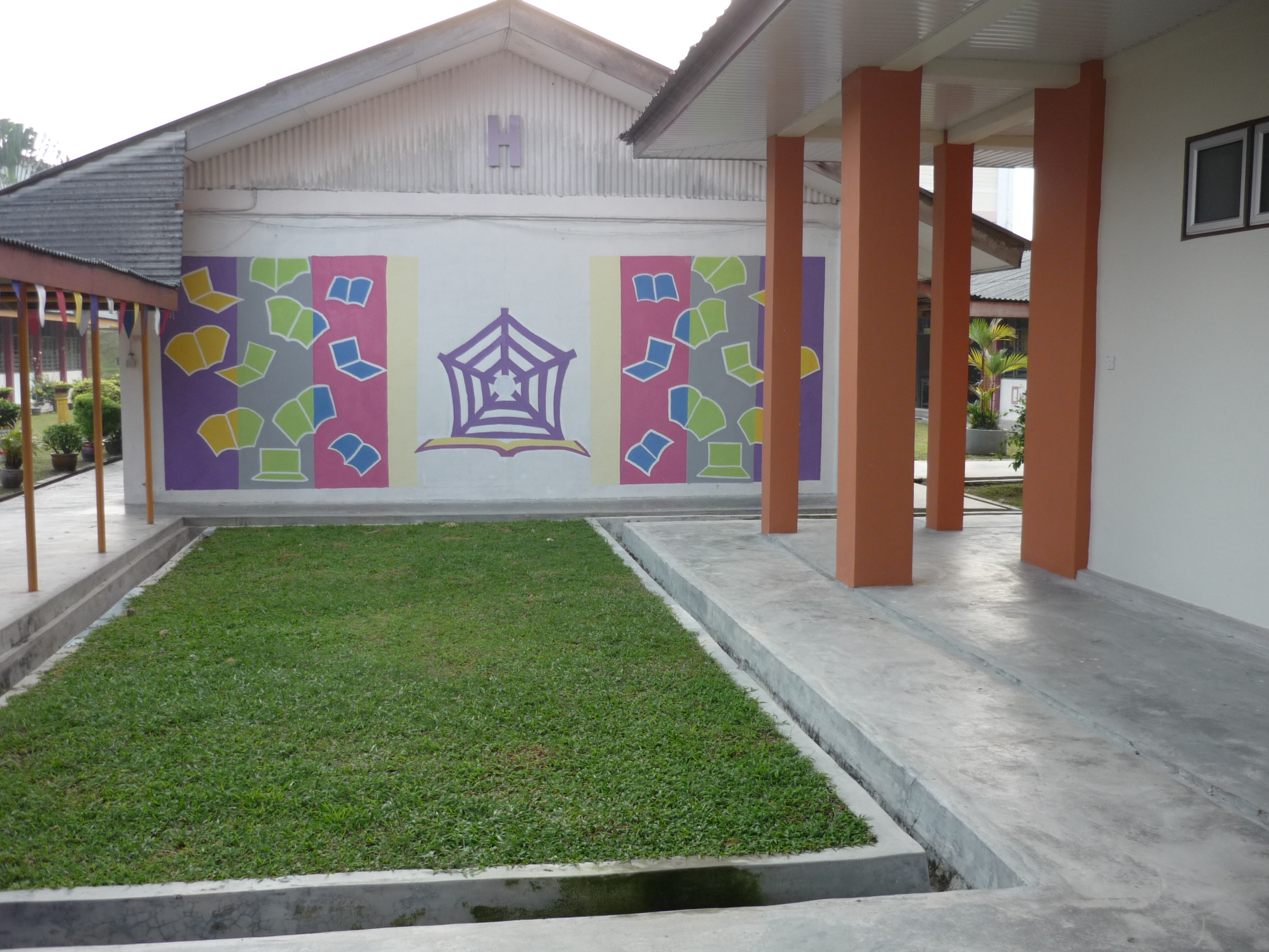 Laluan ke Makmal Komputer, Perpustakaan dan Pusat Akses SMKDA